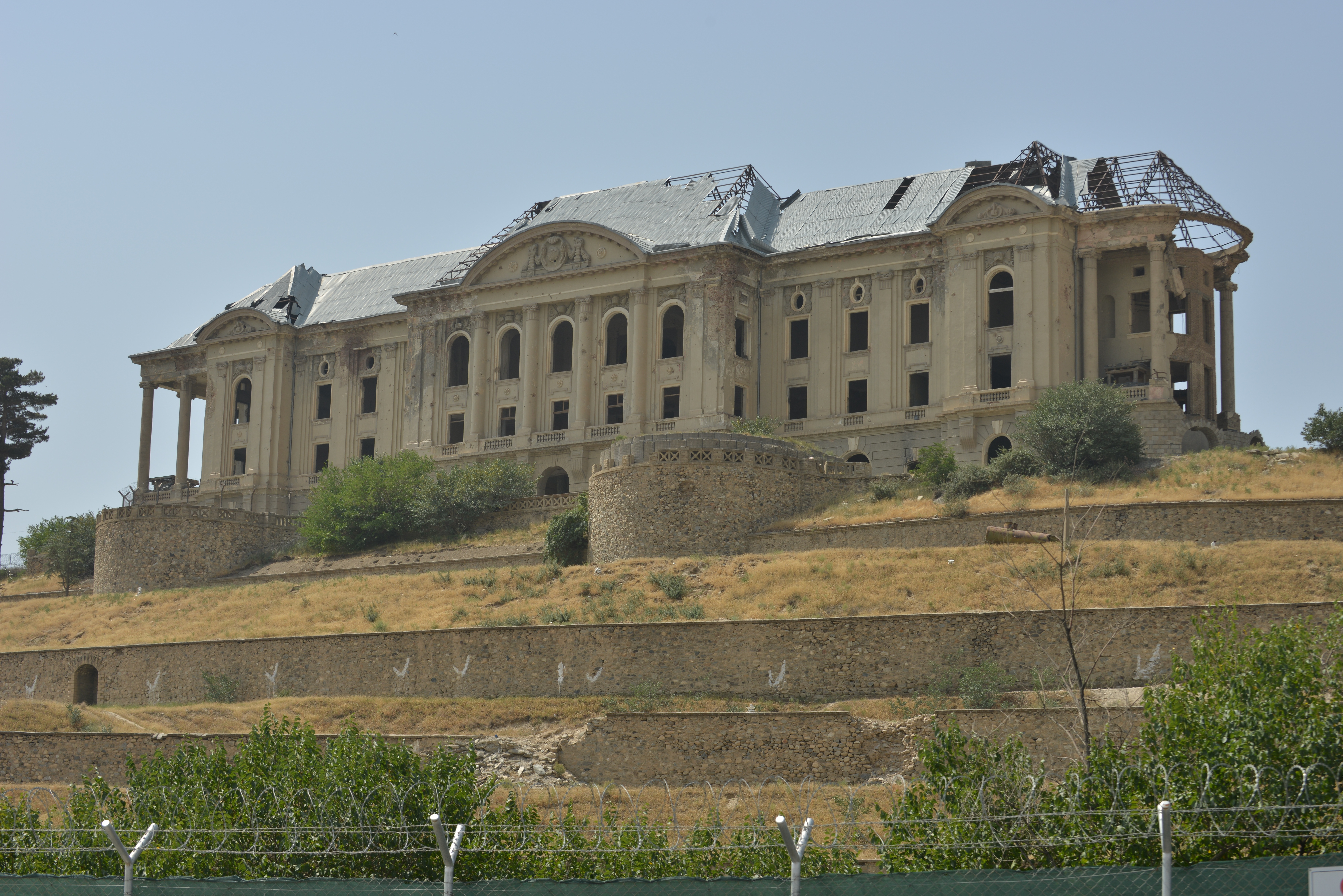 Tajbeg Palace, Kabul